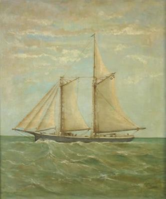 Goleta "Separación Dominicana" en la Batalla de Tortuguero en 1844, Museo Bellapart, dibujado por el Autor Adolfo García Obregón. fecha 1890.